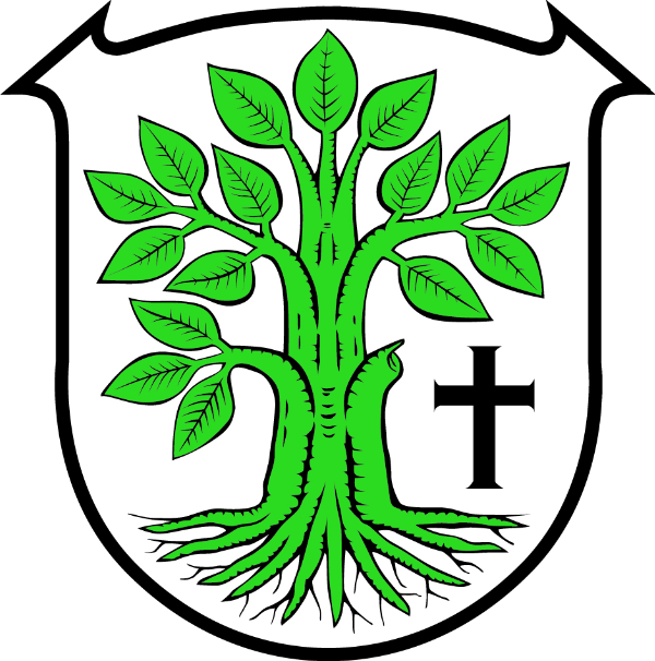 Wappen von Hofbieber